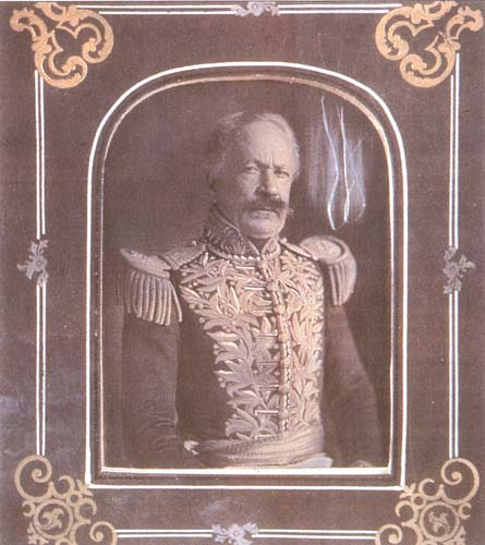 Retrato de Jose Maria Obando